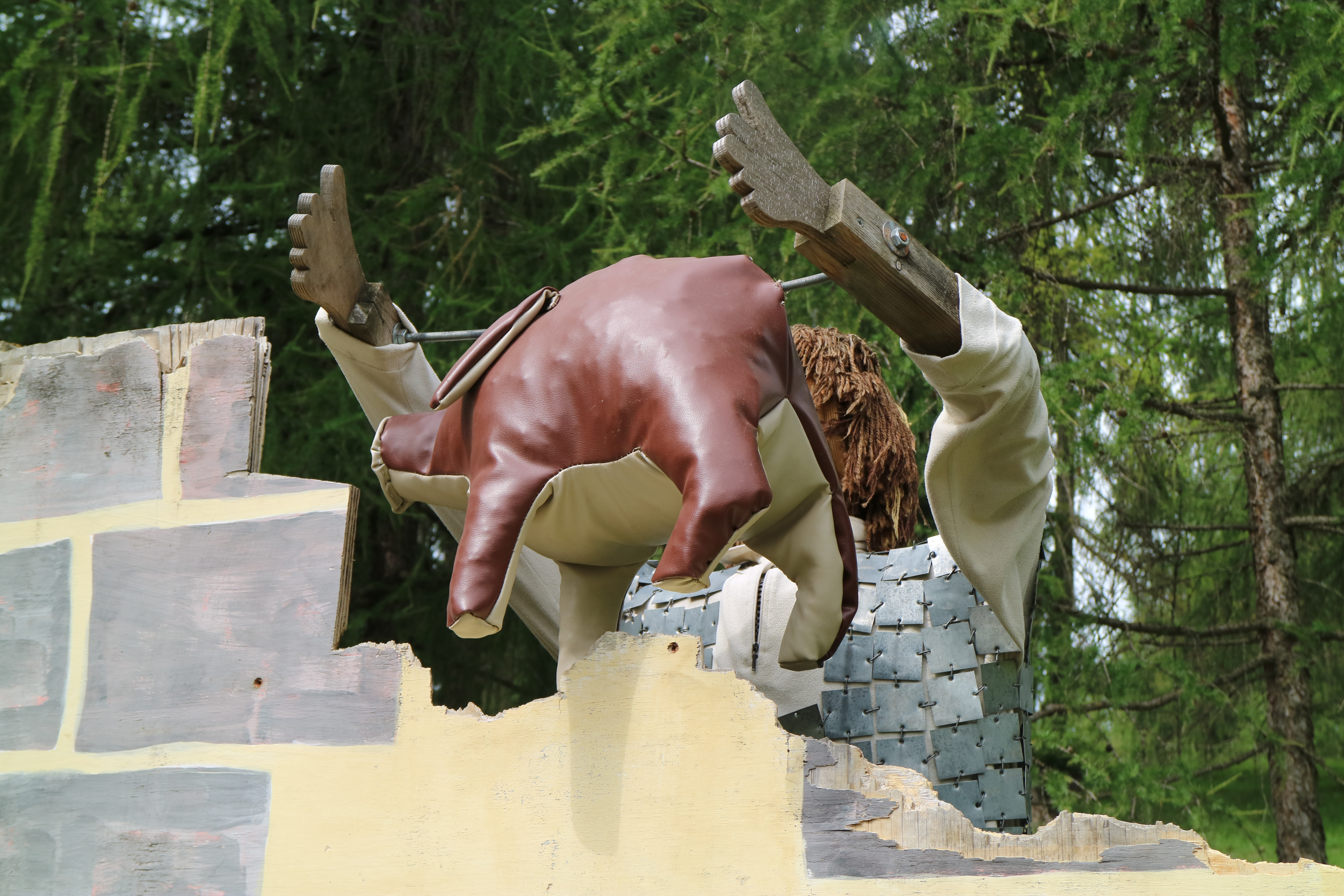 Sage vom Sauschloss, Salten (Tschögglberg), Sarntaler Alpen, Südtirol